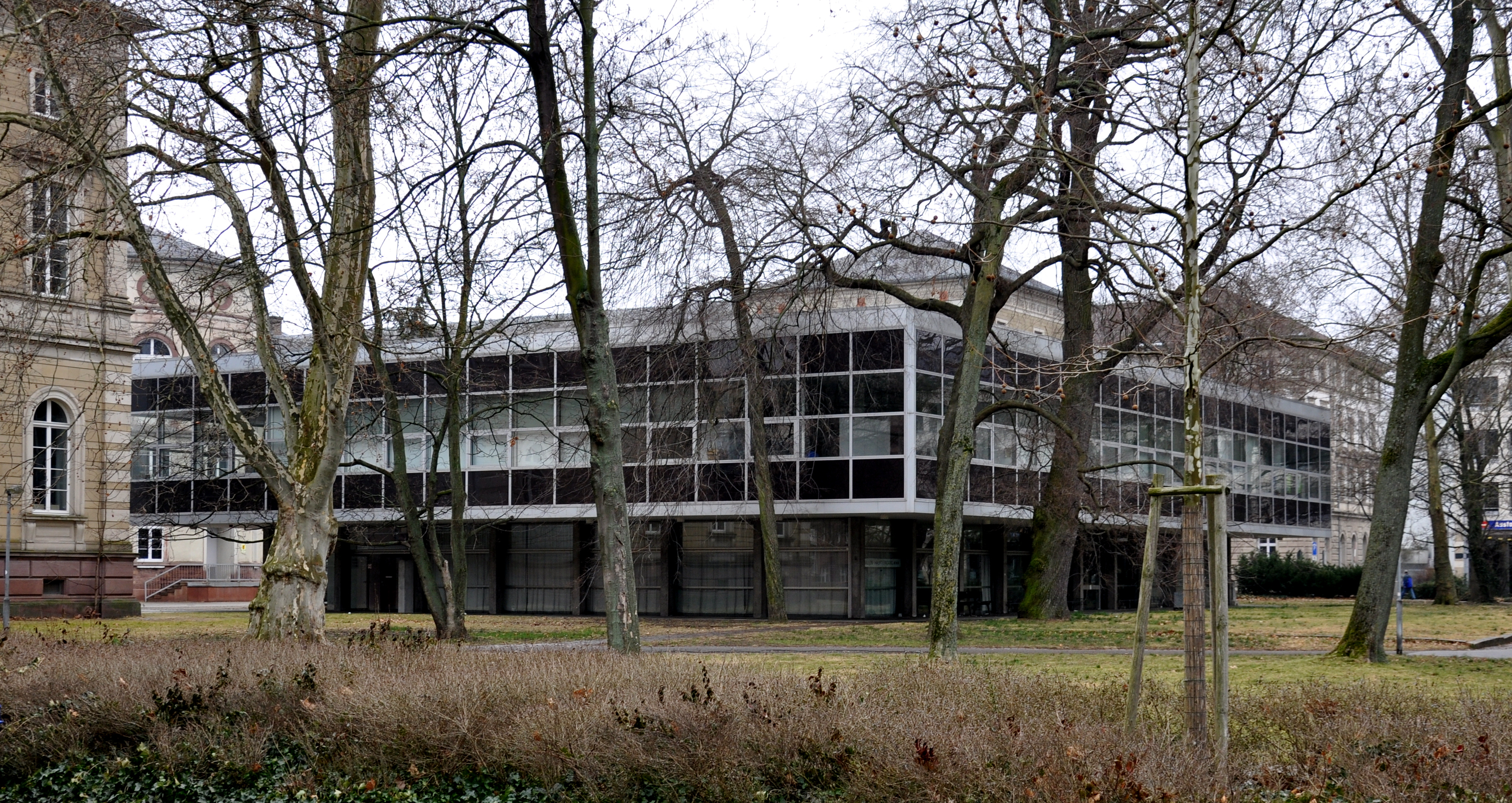 Karlsruhe, Museum für Naturkunde, Pavillon am Nymphengarten